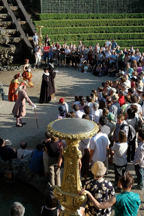 Monsieur de Pourceaugnac (compagnie de la Reine) au festival Le Mois Molière en juin 2006.